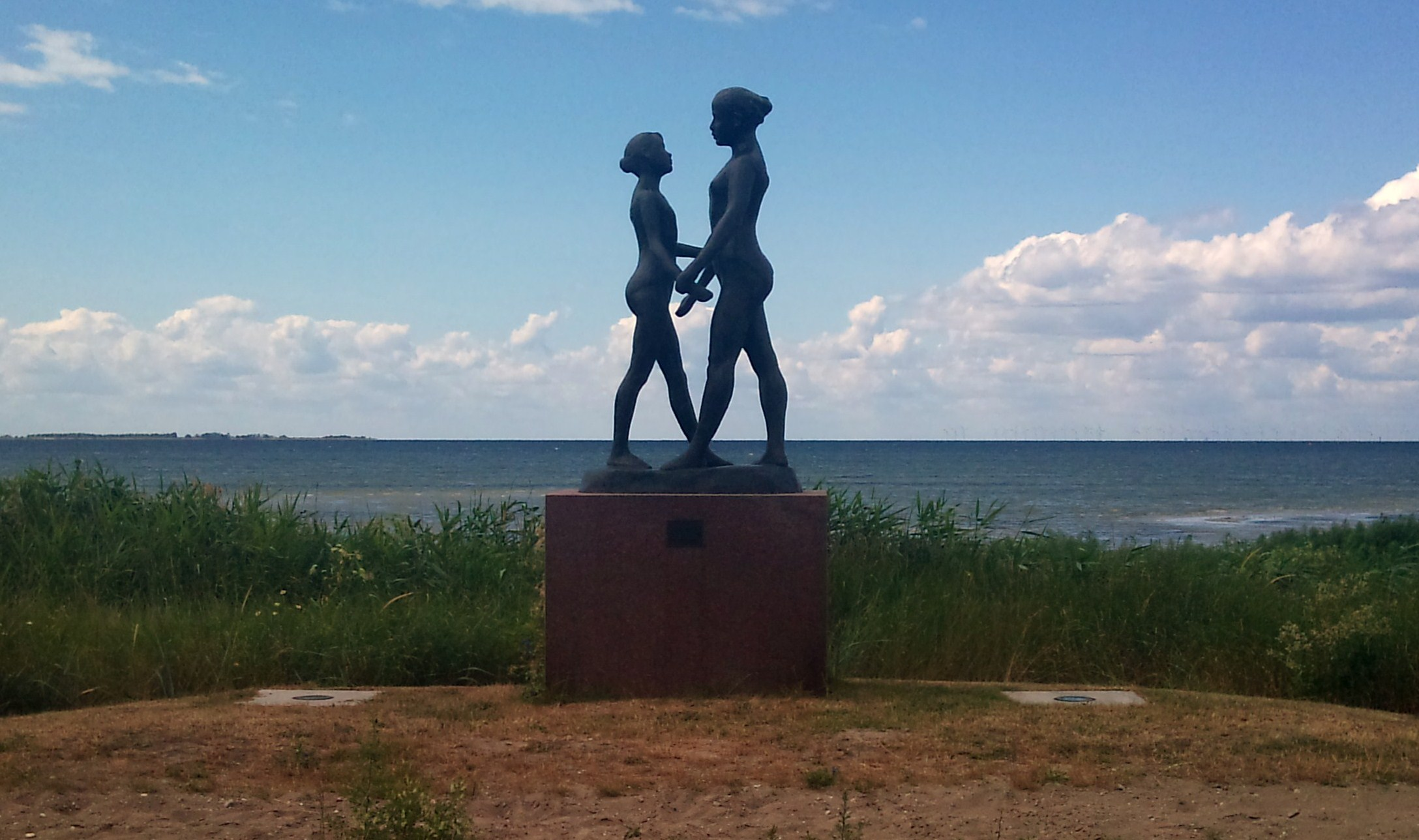 Systrarna av Gudmar Olovson, 2000 Open Air Museum, Höllviken